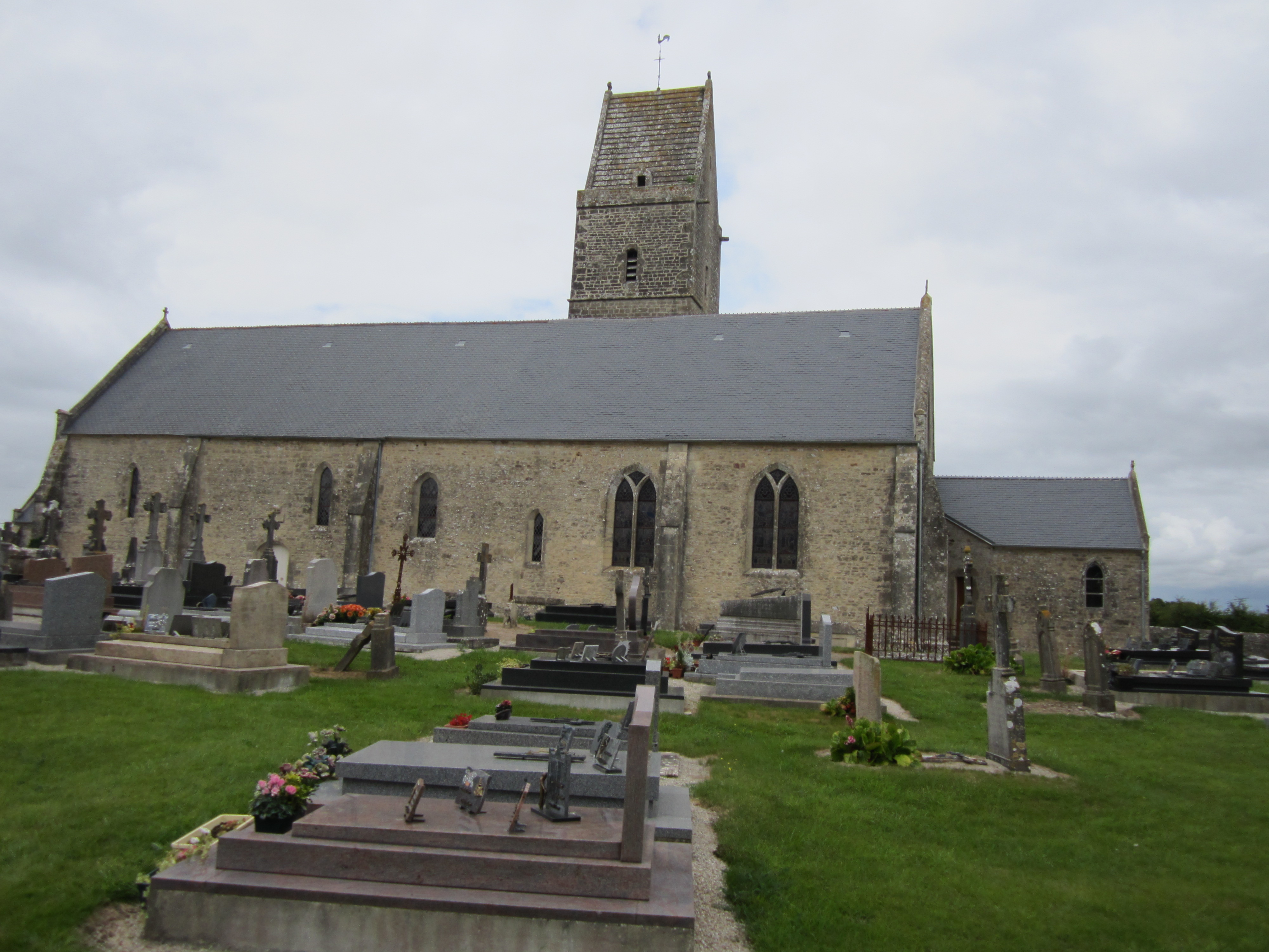 église Saint-Pair de Morville (Manche)